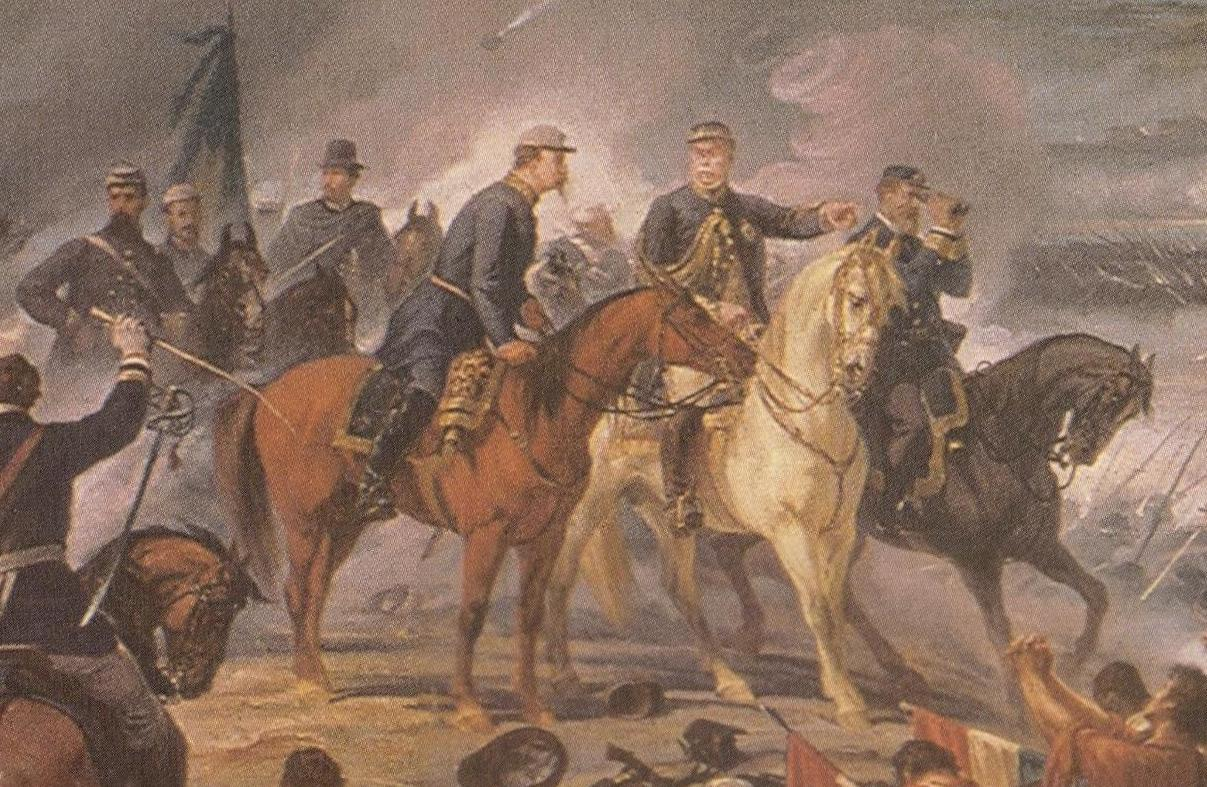 Batalha do Avaí, Museu Nacional de Belas Artes, Brasil